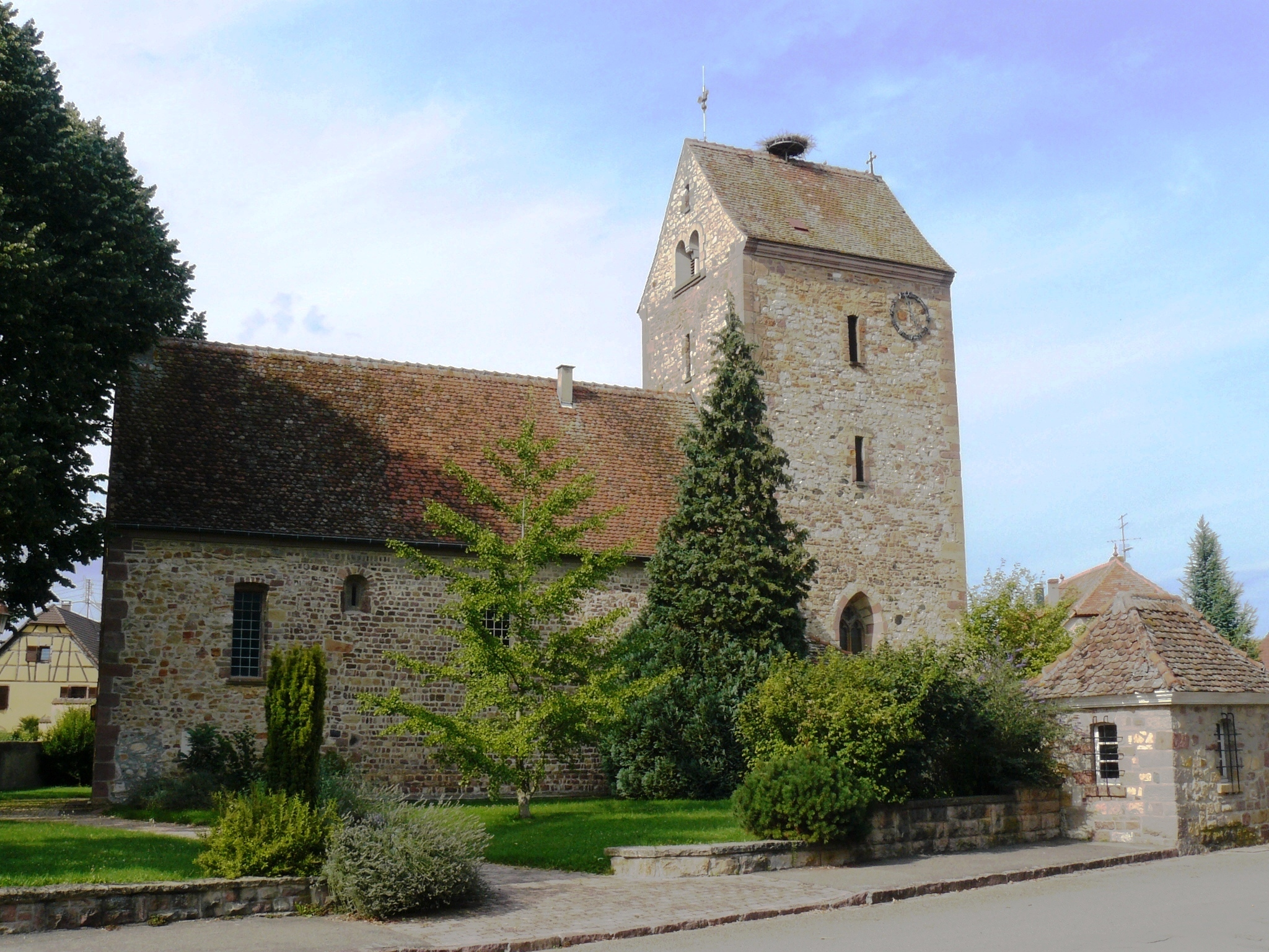 Église Saint-Urbain (XIe siècle)